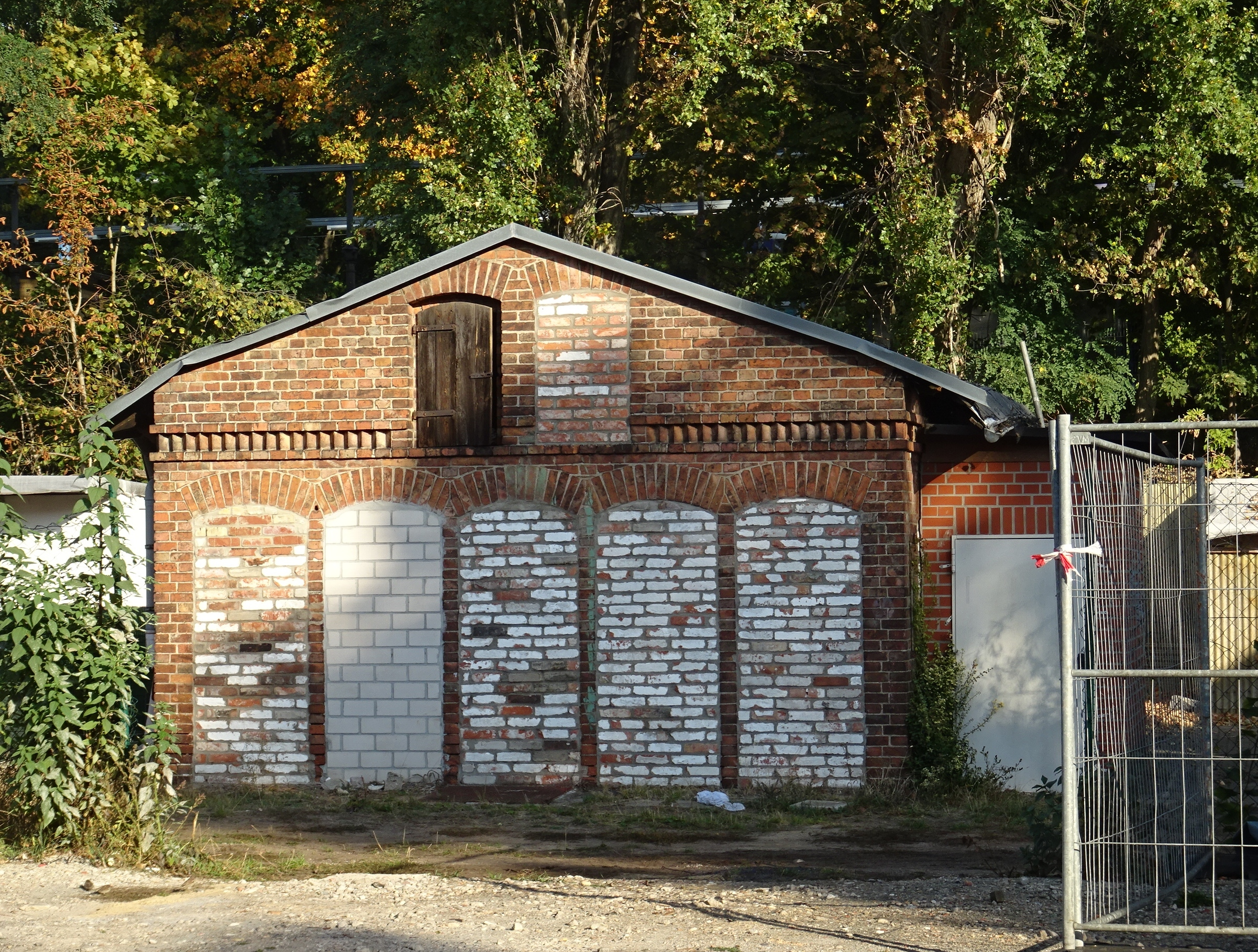 Bahnhof Berlin Karl-Bonhoeffer-Nervenklink, denkmalgeschütztes Wirtschaftsgebäude